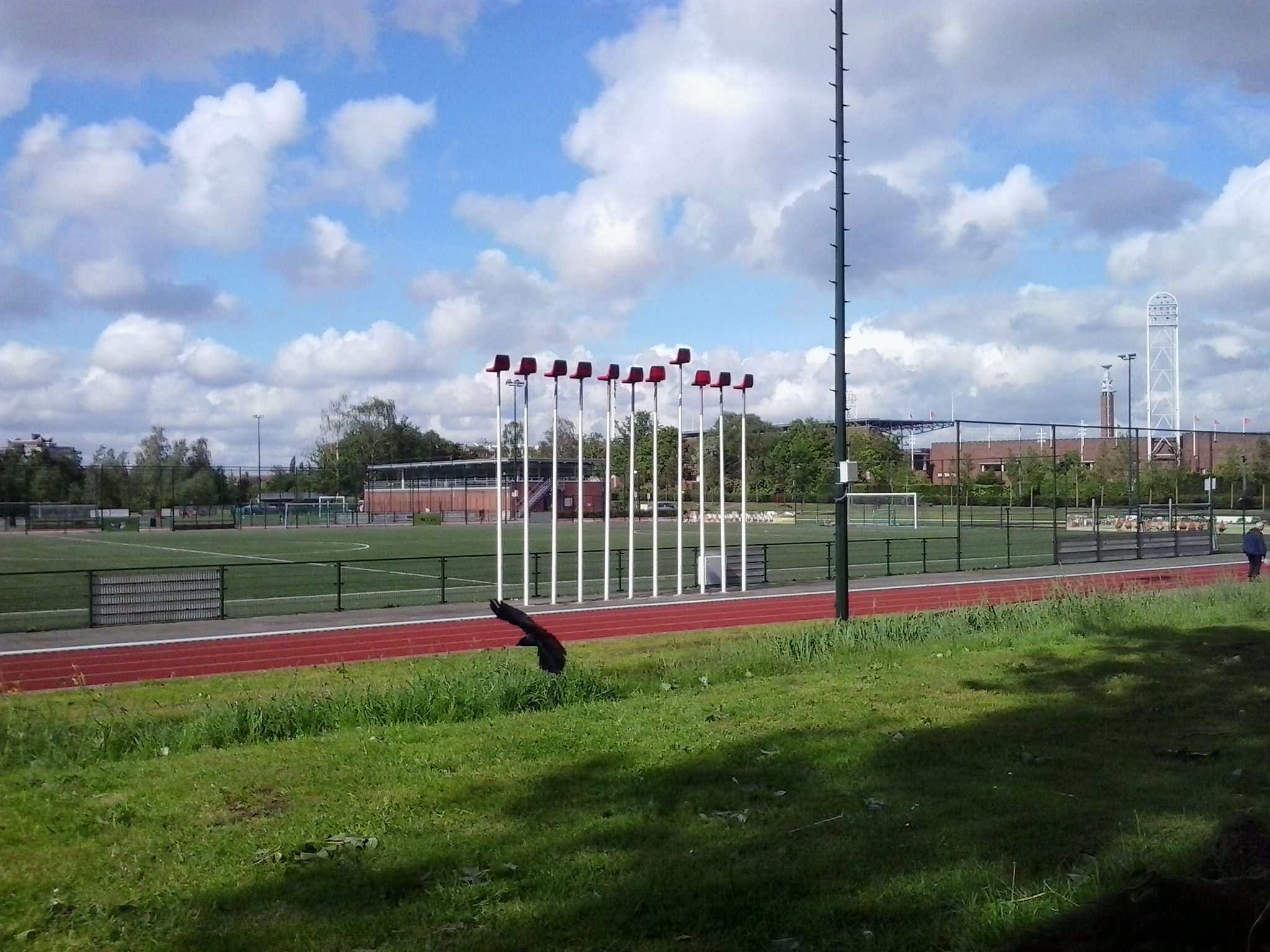 Wave, kunstwerk van Zoro Feigl